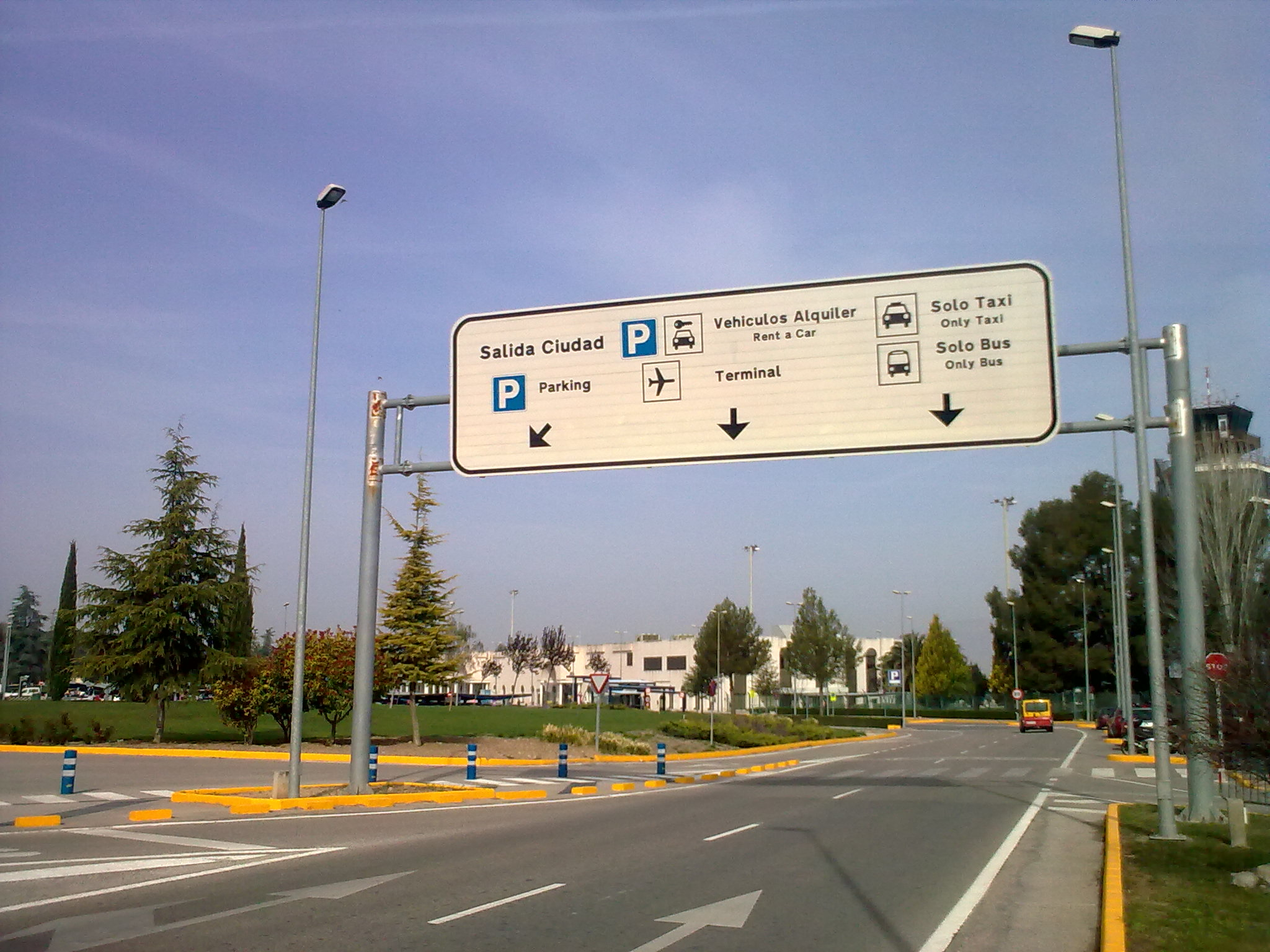 Aeropuerto de Granada, señal de entrada